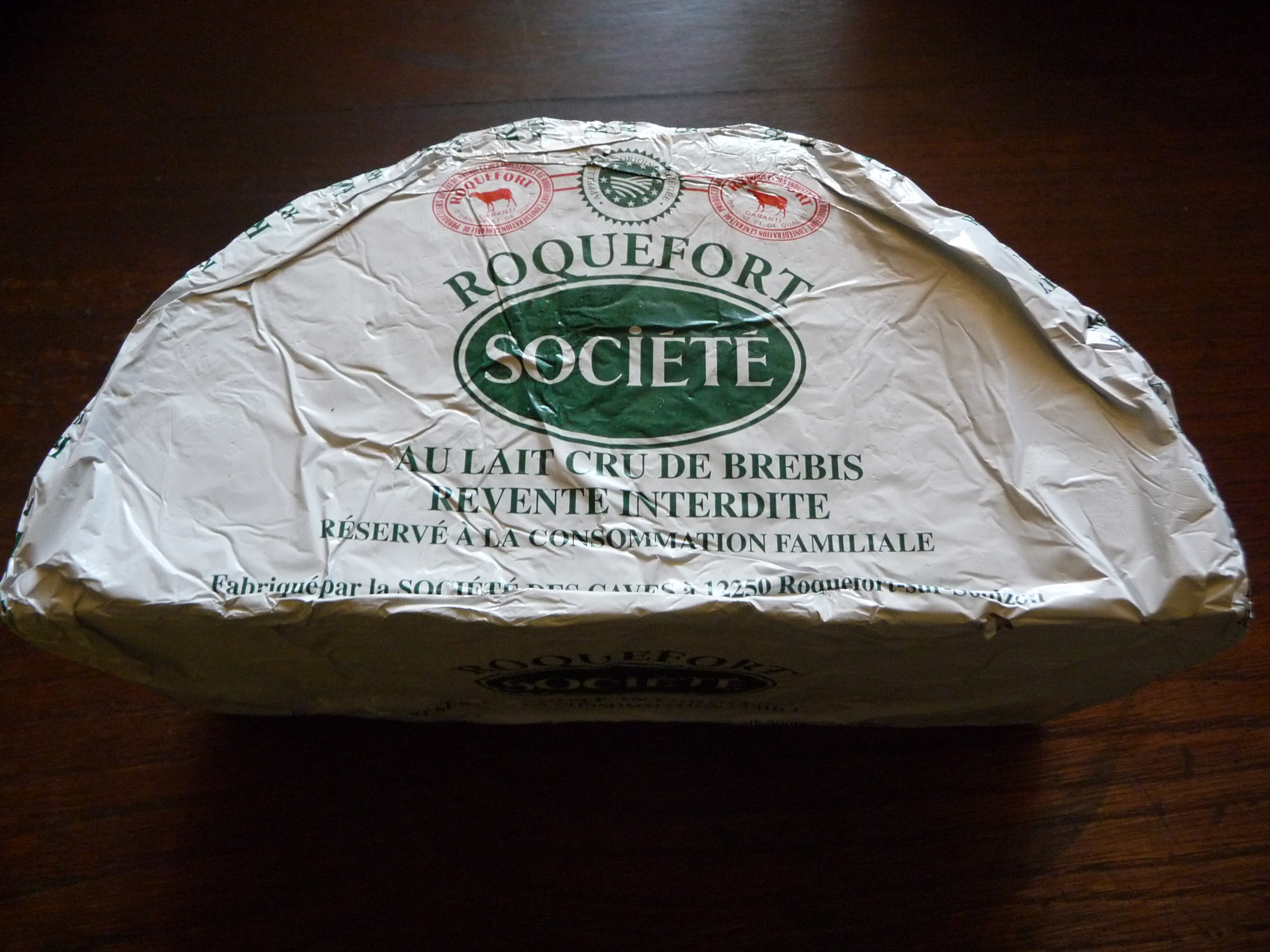 Fourme de roquefort pour cultivateurs